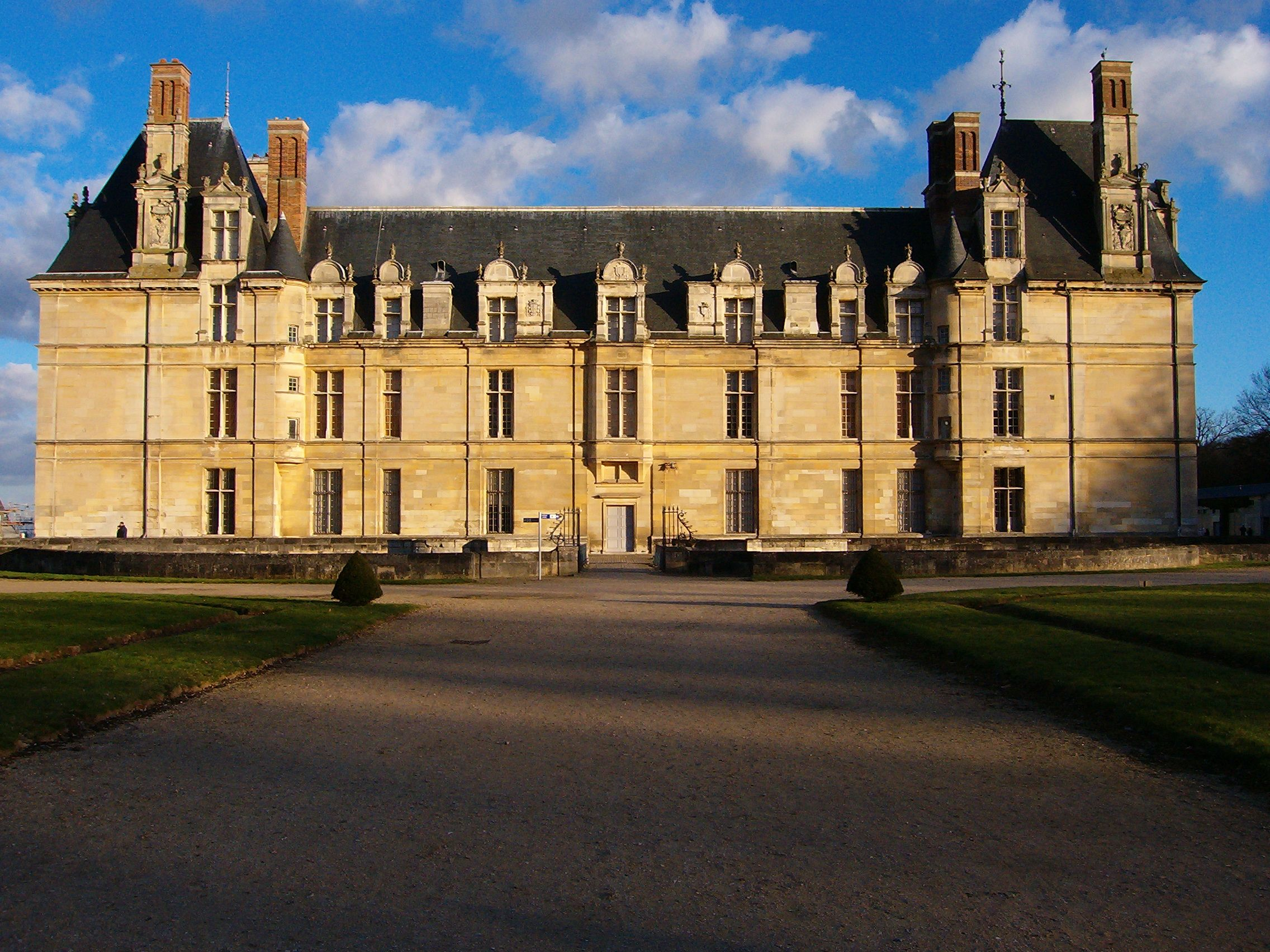 Chateau d'Ecouen